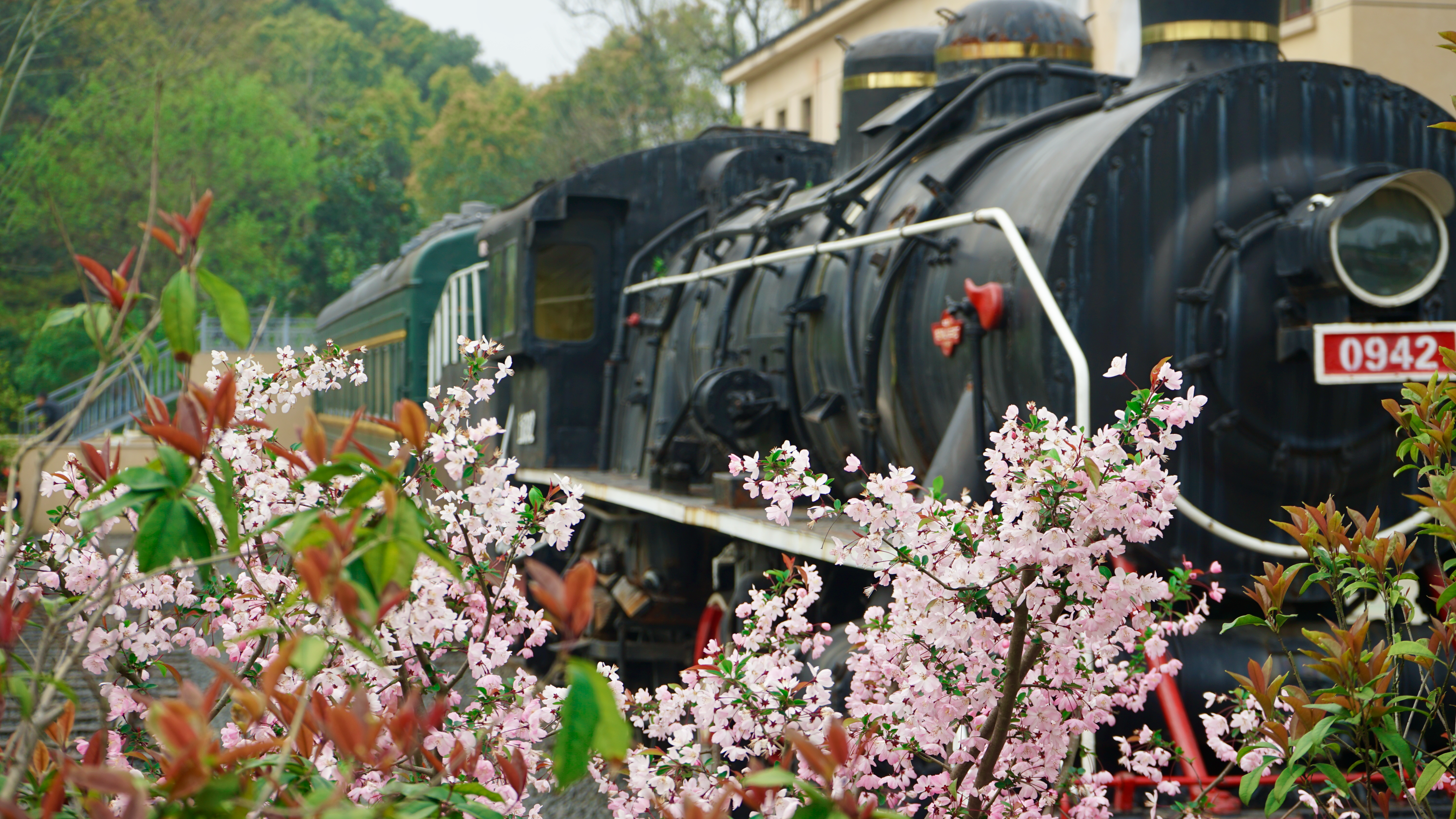 中文（中国大陆）: 浙江省海宁市西山公园中的一节旧车厢